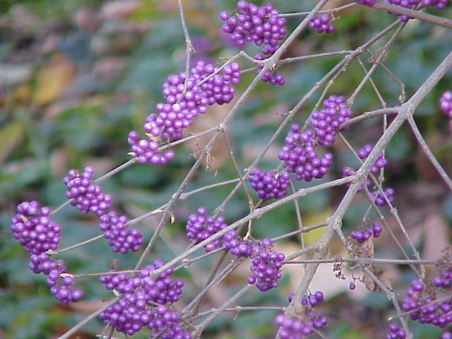 Species: Callicarpa bodinieri giraldii Family: Verbenaceae Image No. 1